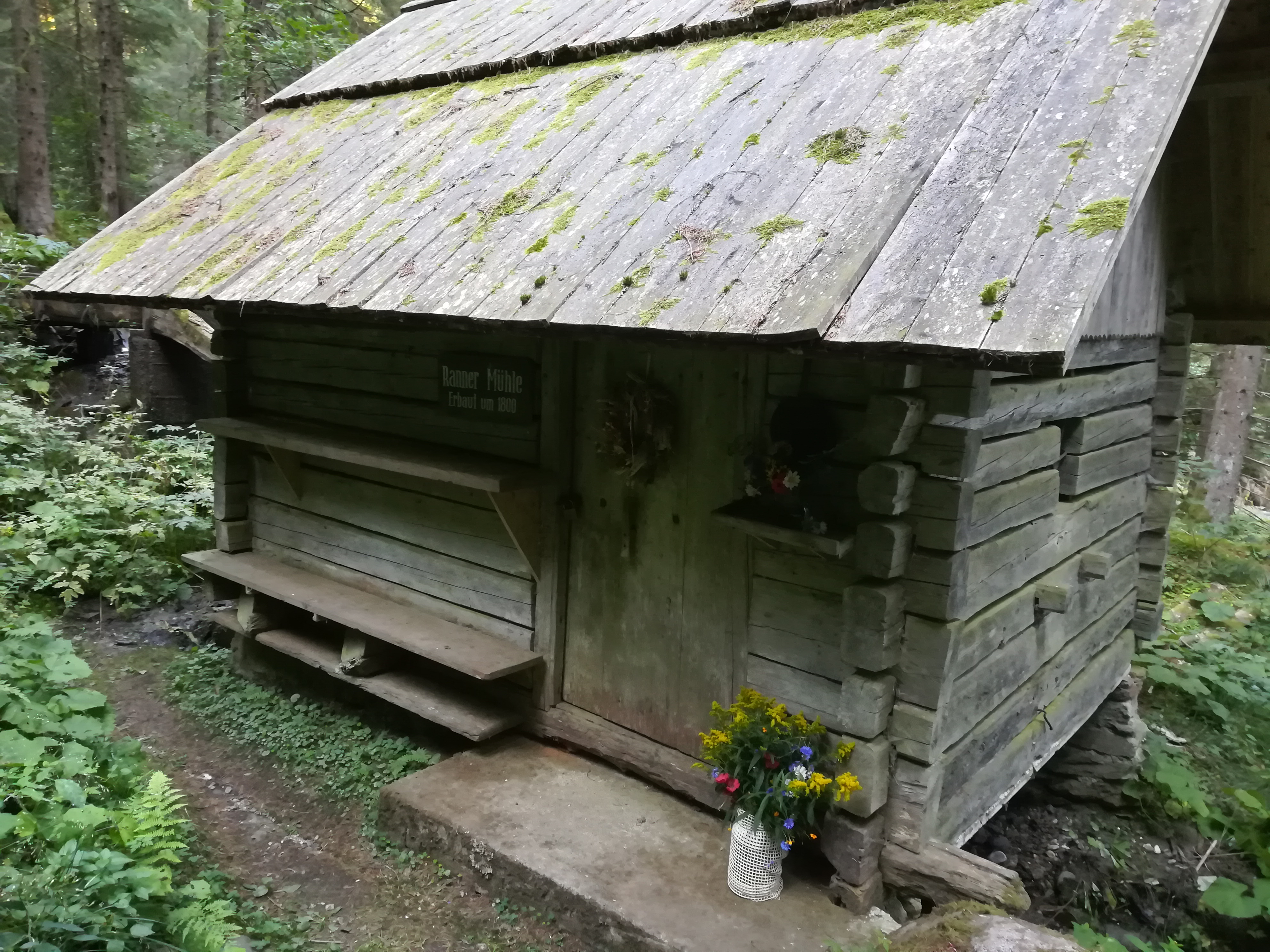 Rannermühle in Kaning bzw. am Kaninger Mühlenwanderweg. Um 1800 erbaut.